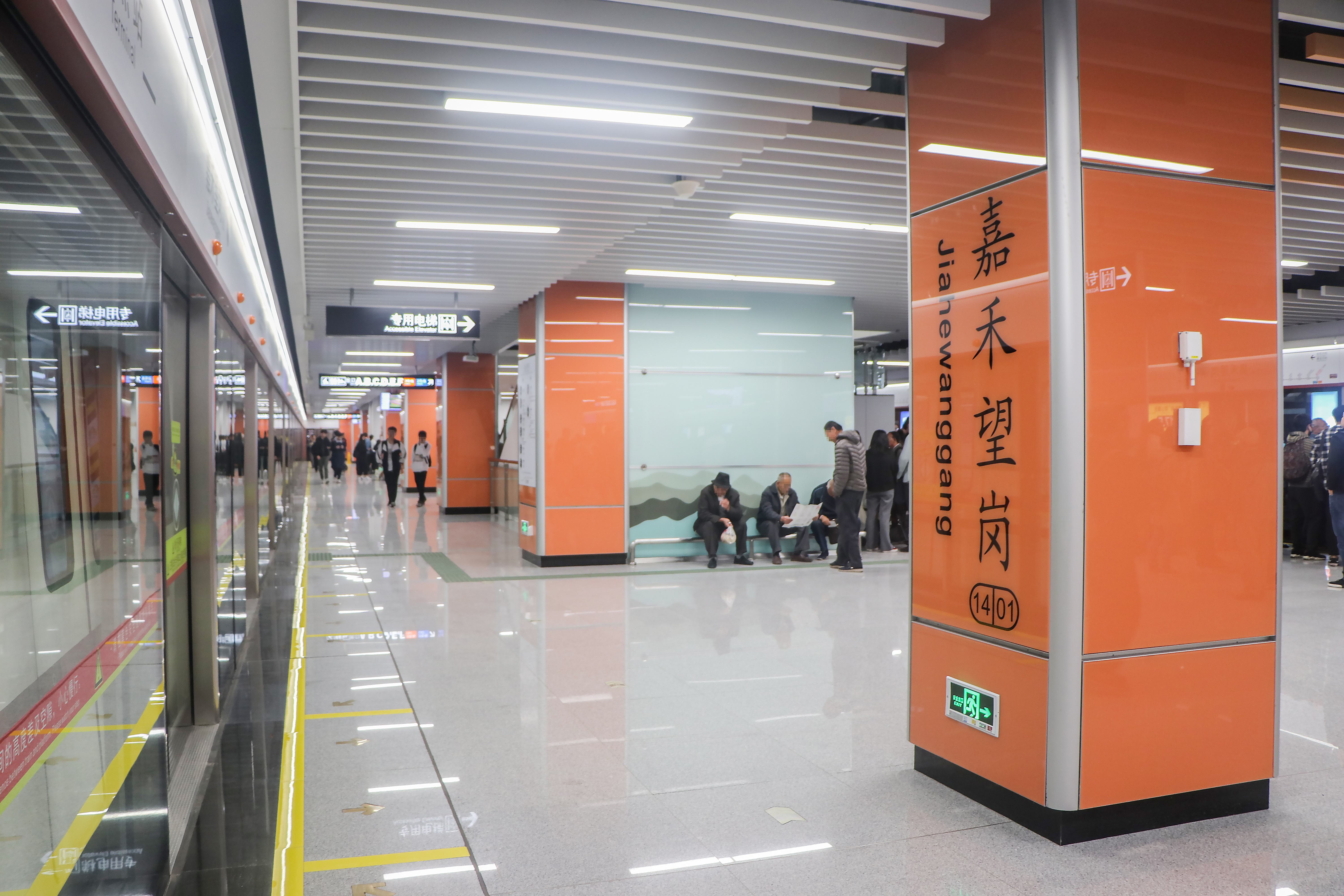 广州地铁嘉禾望岗站